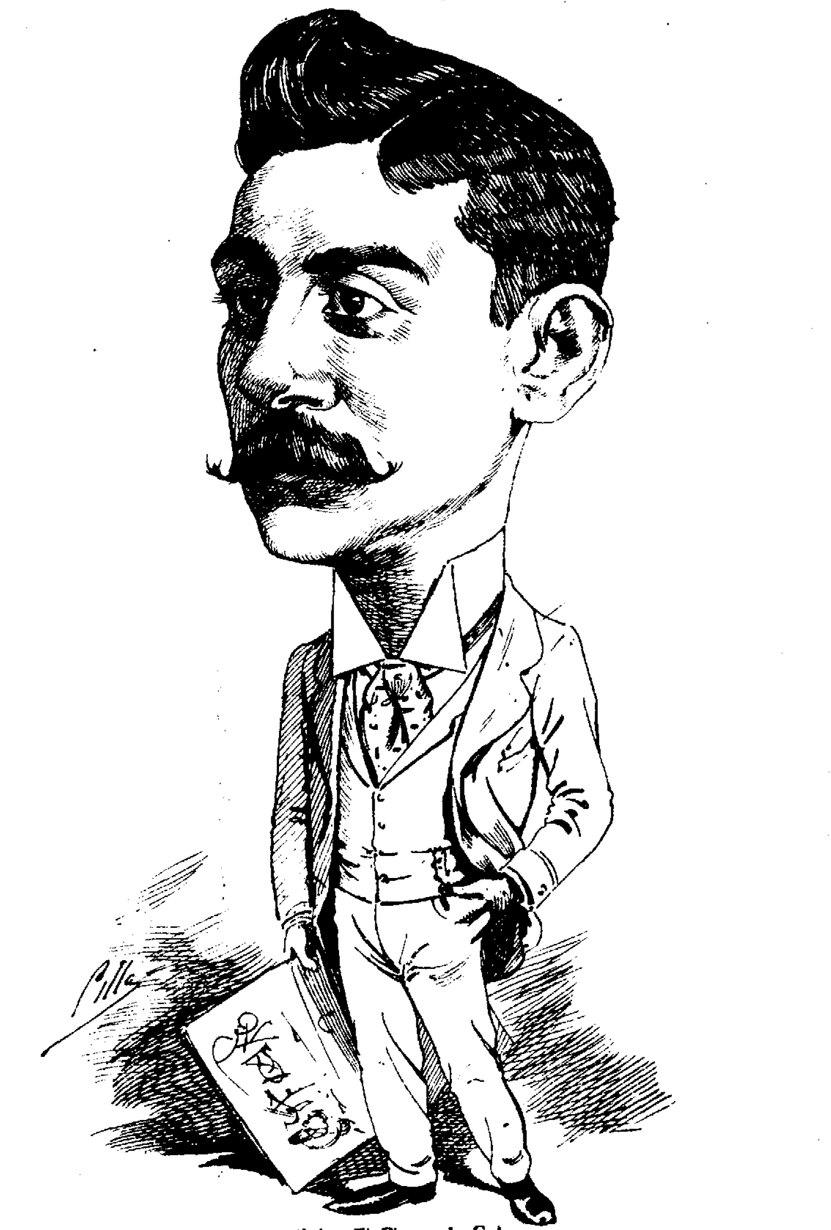 Madrid Cómico, 12 de julio de 1890.